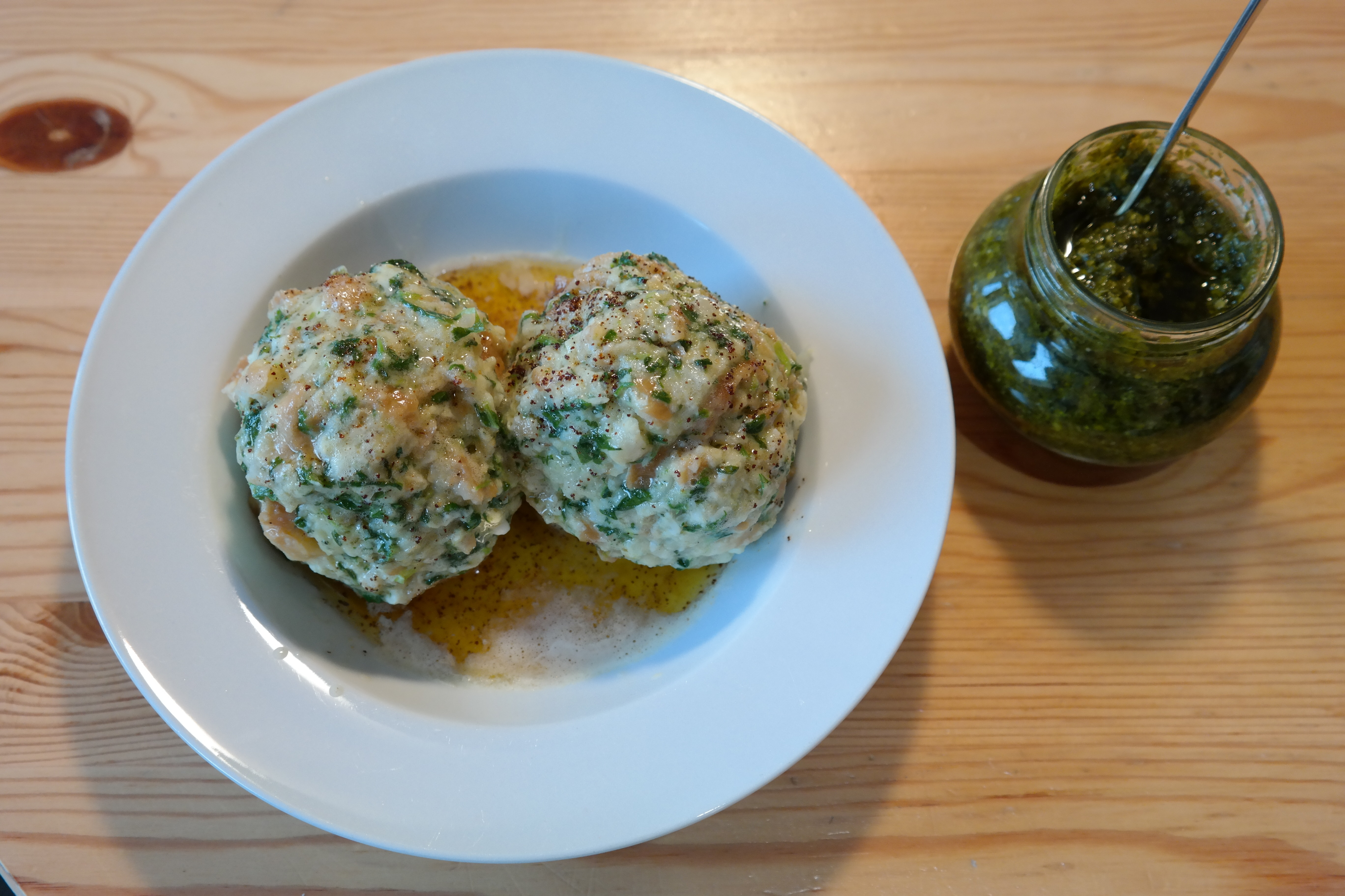 Spinatknödel knödel spezialität pesto